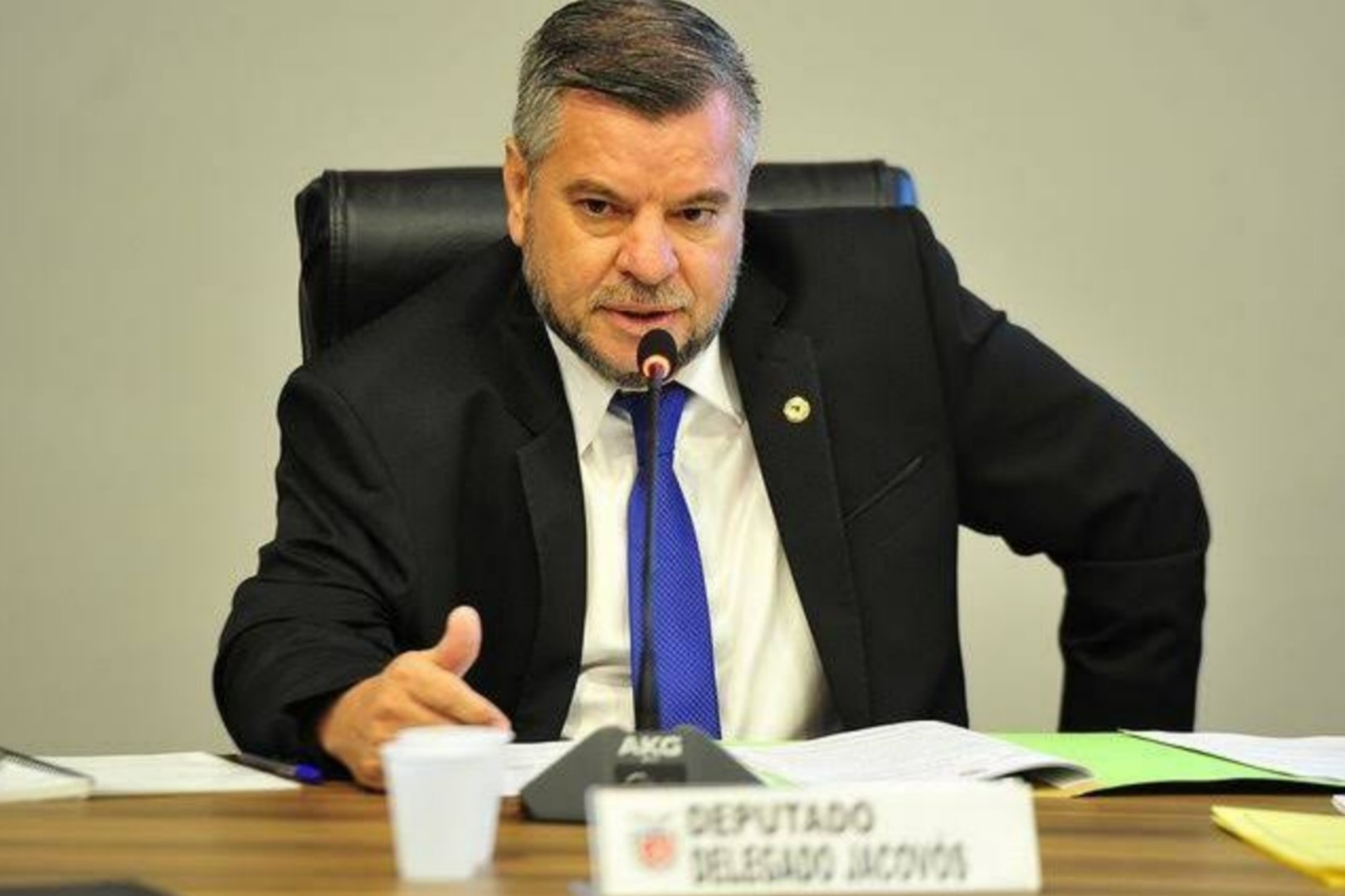 Deputado Delegado Jacovós cobra conclusão do hospital da criança de Maringá